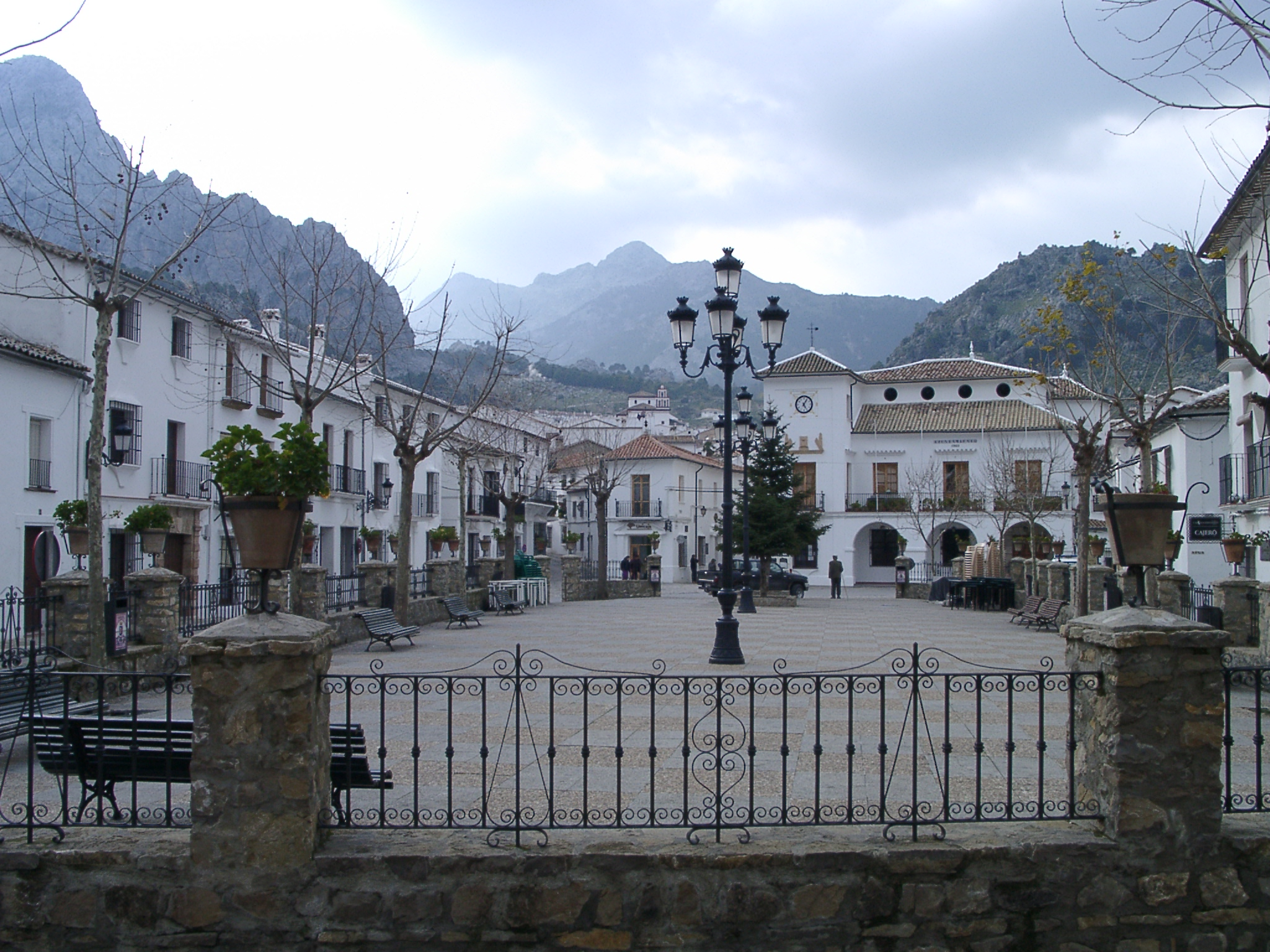 Square in Grazalema, provincia de Cádiz, Andalucía.